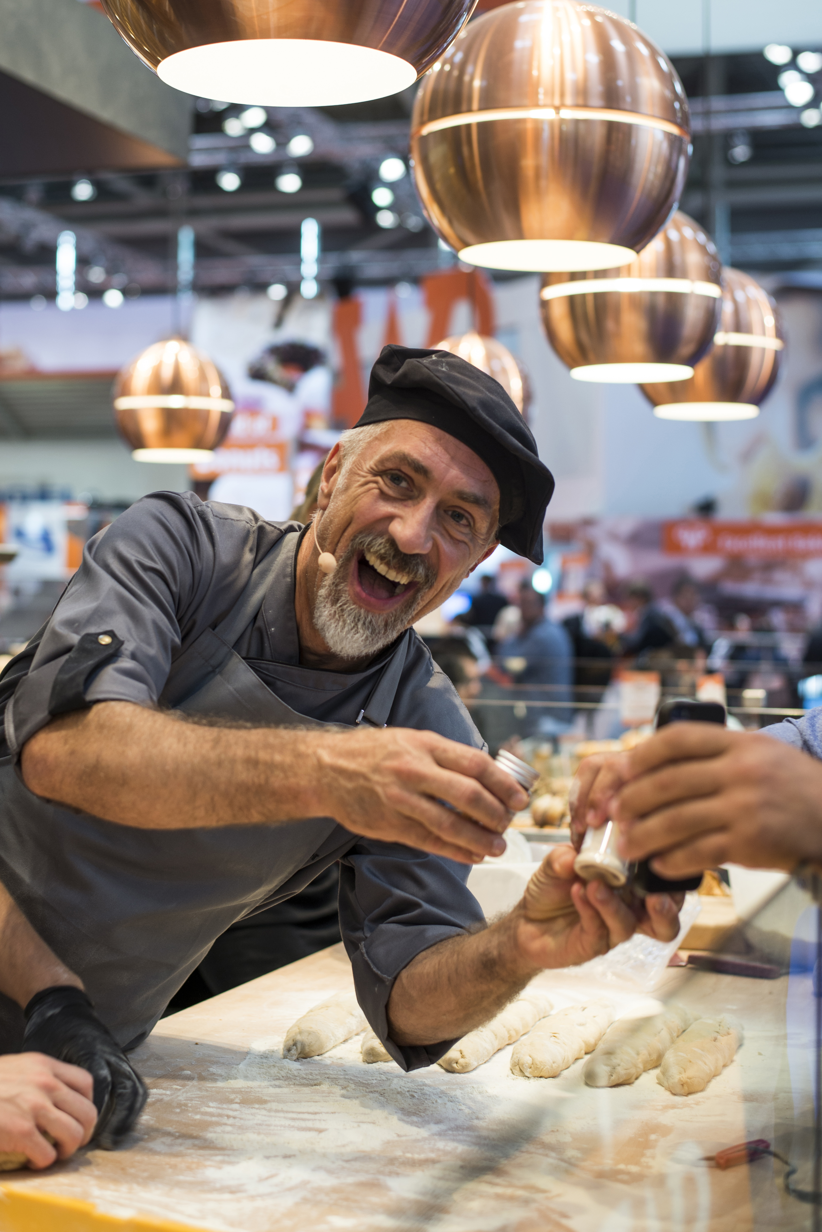 Begeisterte Bäcker auf der iba 2015